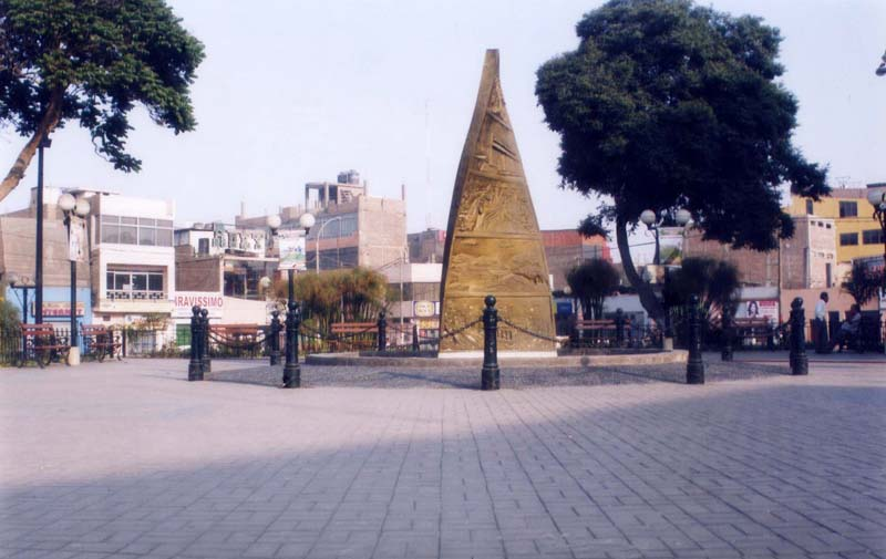 Plaza de Armas de la Provincia de Huaral (Lima, Perú).